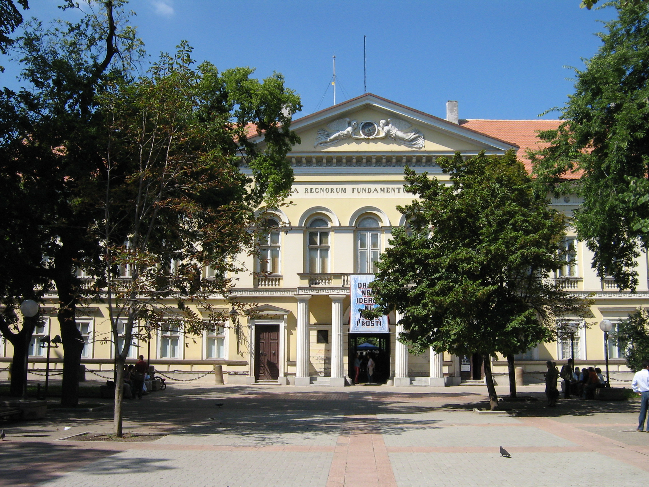 People's Museum in Pančevo/Narodni muzej u Pančevu